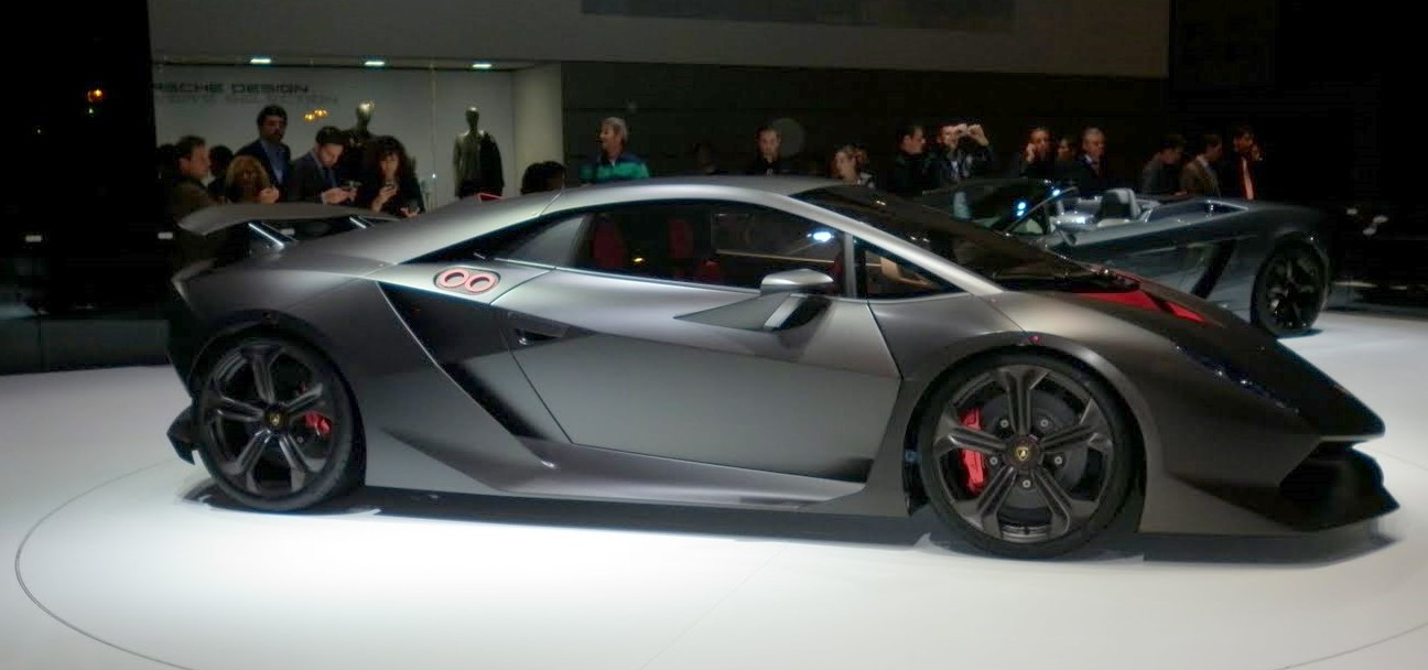 Lambo sesto elemento Paris 2010